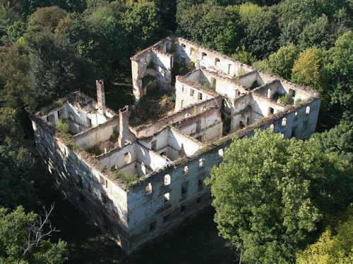 Widok ruin chrzelickiego zamku z lotu ptaka. Stan w roku 2006